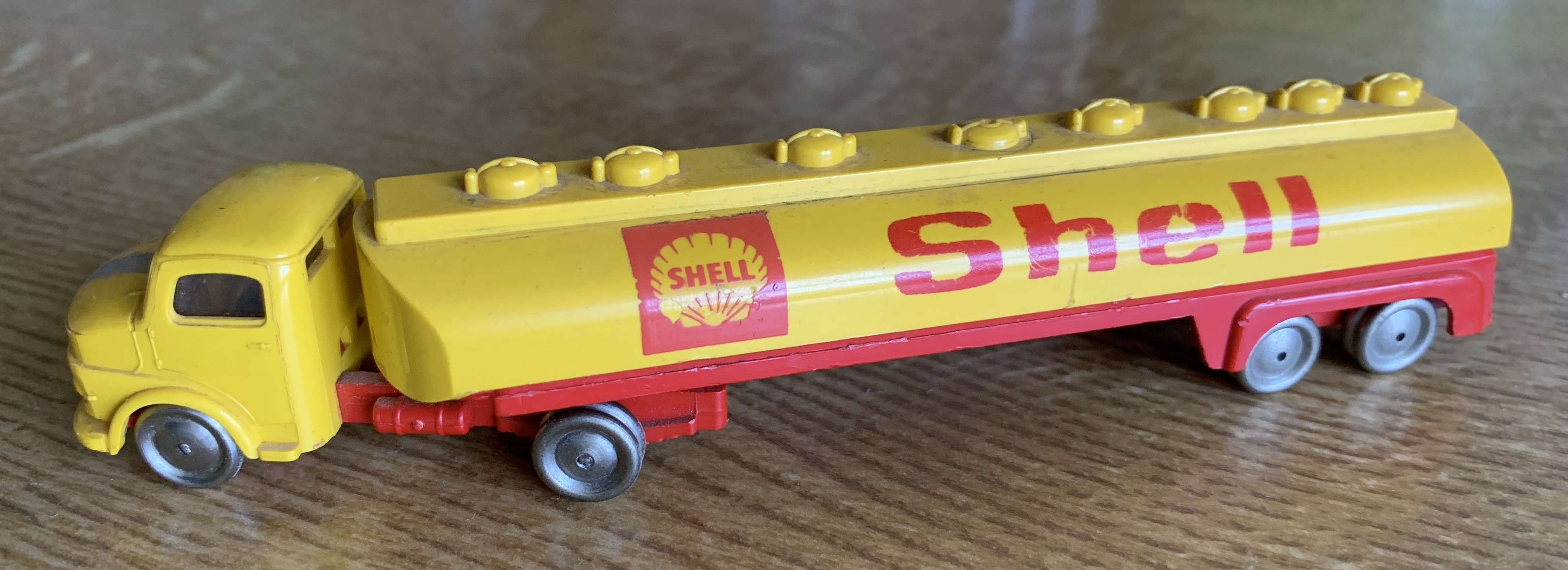 LEGO - MB Kurzhauber Tanker (1960er)